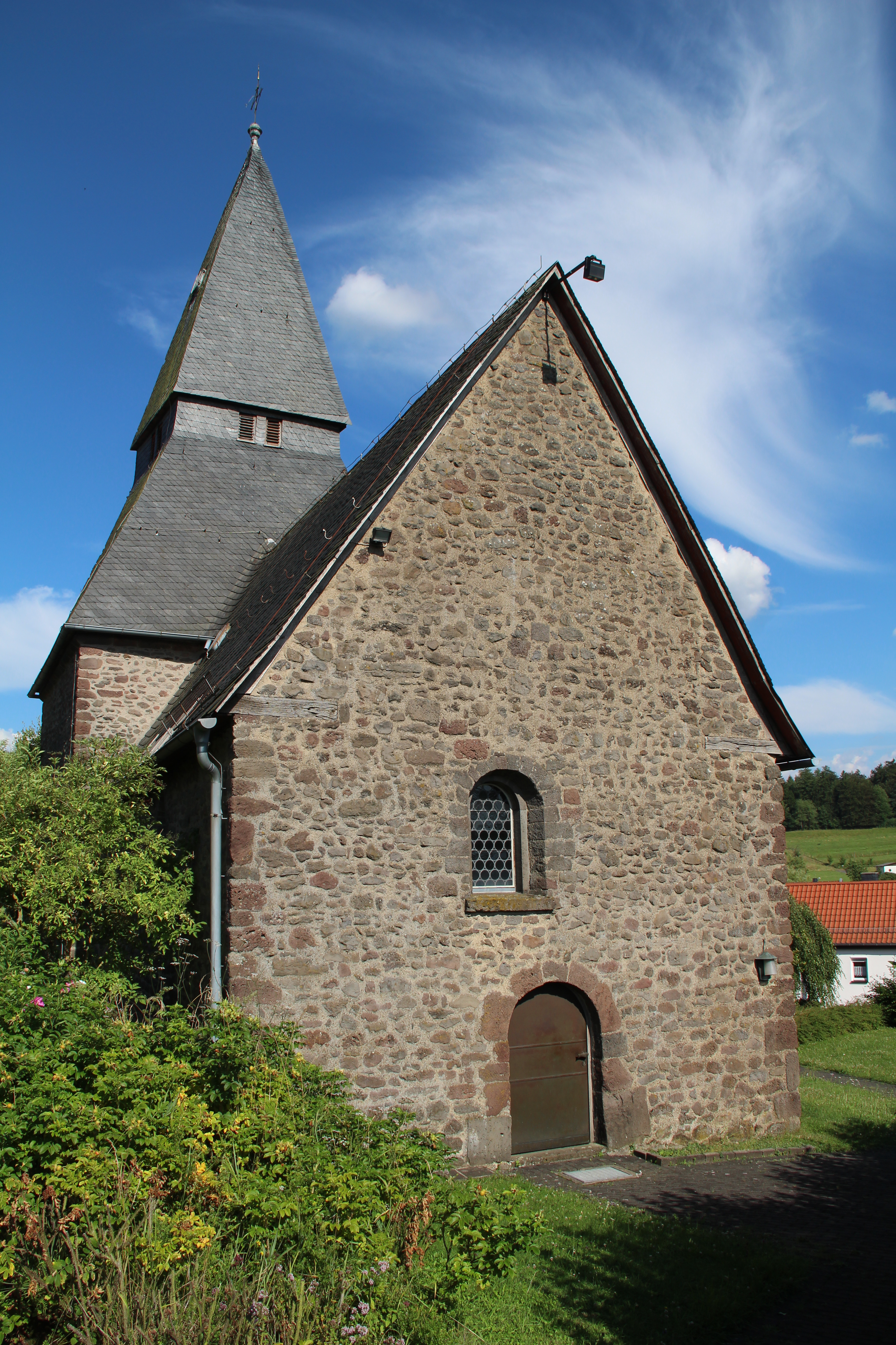 Kirche von Odenhausen (Lumda)